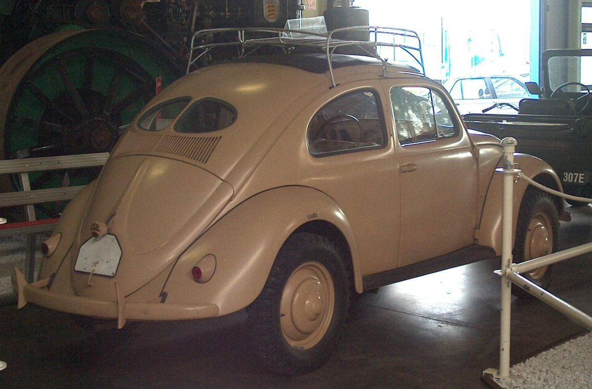 Volkswagen Beetle Type 82, All-Wheel-Drive Verson of the Wehrmacht - Technical Museum Sinsheim (Germany)